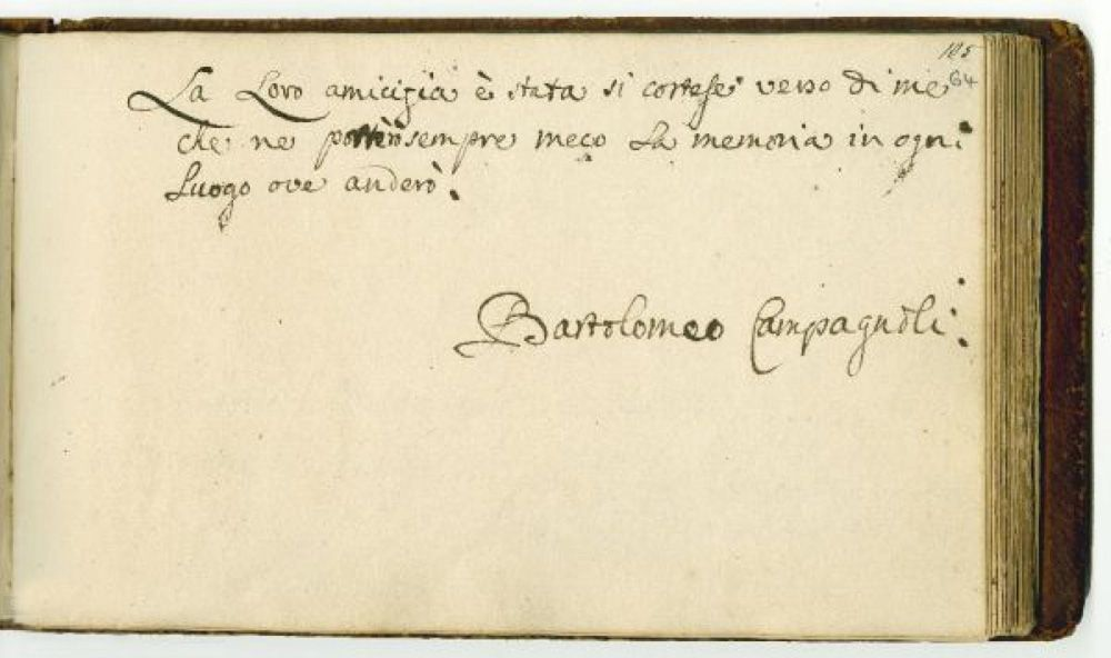 Stammbucheintrag in italienischer Sprache: "La Loro amicitia è stata si cortese verso di me che ne portero sempre meco la memoria in ogni. Luogo ove andero."; mit Autogramm: "Bartolomeo Campagnoli." (Adressatin: Katharina Börner)